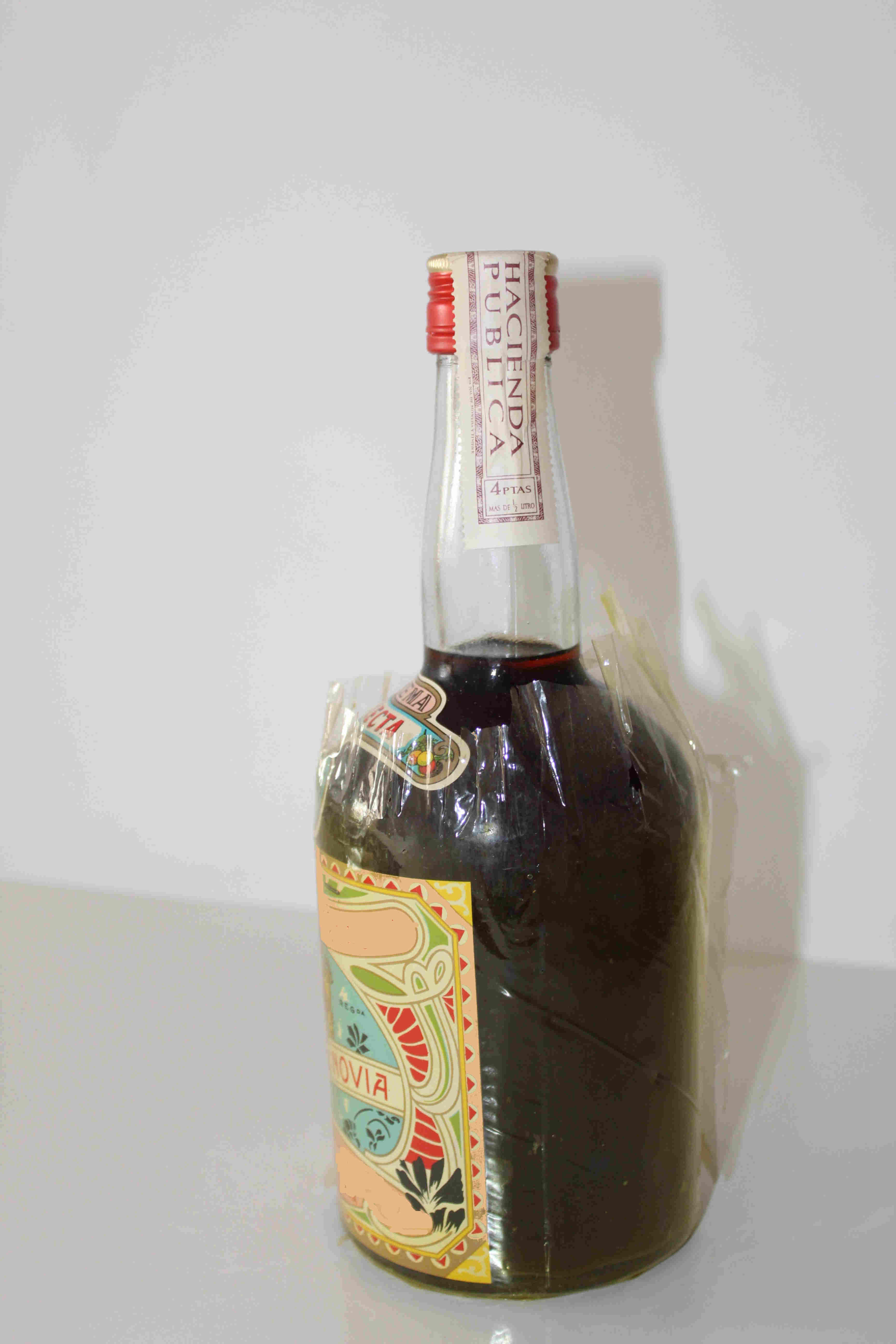 Botella de los años 50 de Beso de Novia, no se determina fabricante, y se aprecia la precinta de 4 ptas.